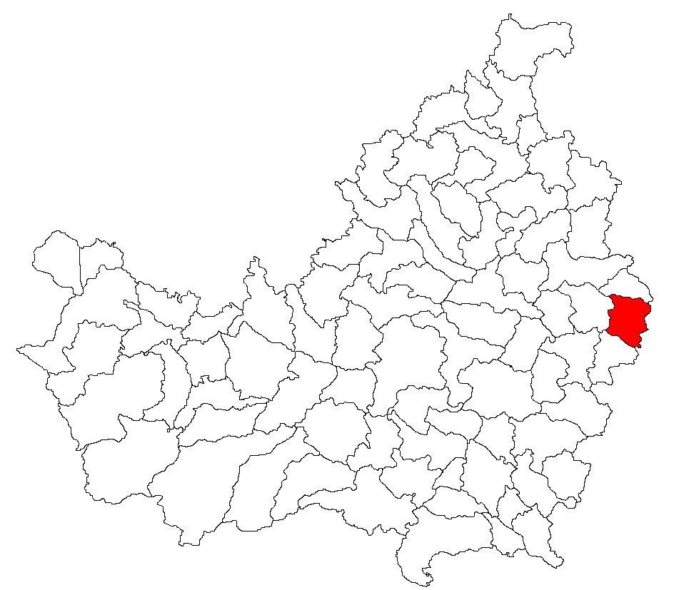 Categorie:Hărţi ale judeţului Cluj